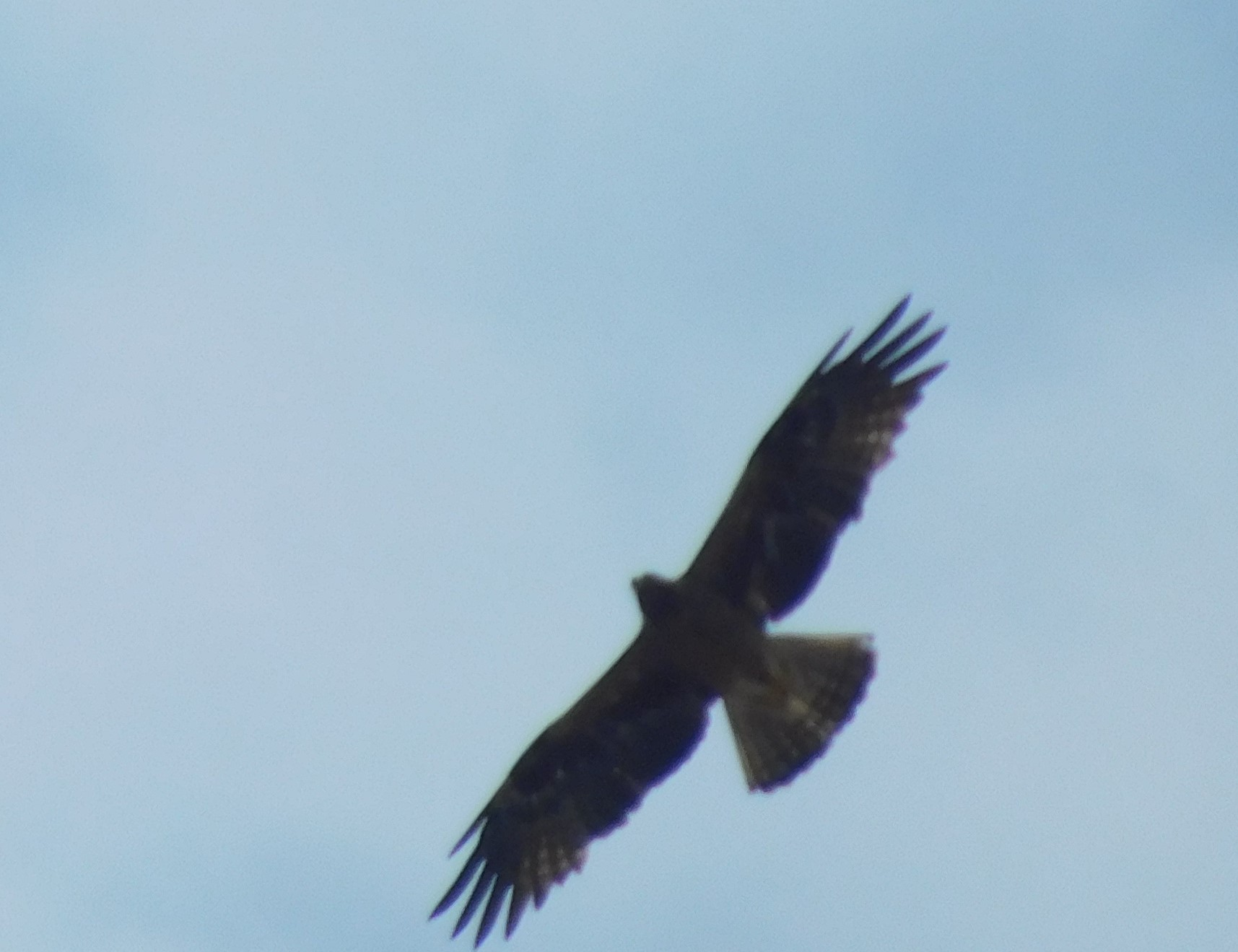 Srpski (latinica): Patuljasti orao (Hieraaetus pennatus) je ptica selica iz reda orlova i jastrebova (Accipitriformes). U Srbiji je retka i malobrojna gnezdarica. Rasprostranjen je u pobrđu i brdsko-planinskim predelima južno od Save i Dunava, jugoistočnom Banatu, kao i u Sremu na Fruškoj gori. Procenjuje se da je populacija bila u opadanju poslednjih nekoliko decenija, ali i da se brojnost stabilizovala tokom poslednjih godina. Nastanjuje mozaične predele pobrđa sa šumskim i stepskim fragmentima (Šćiban i sar., 2015).